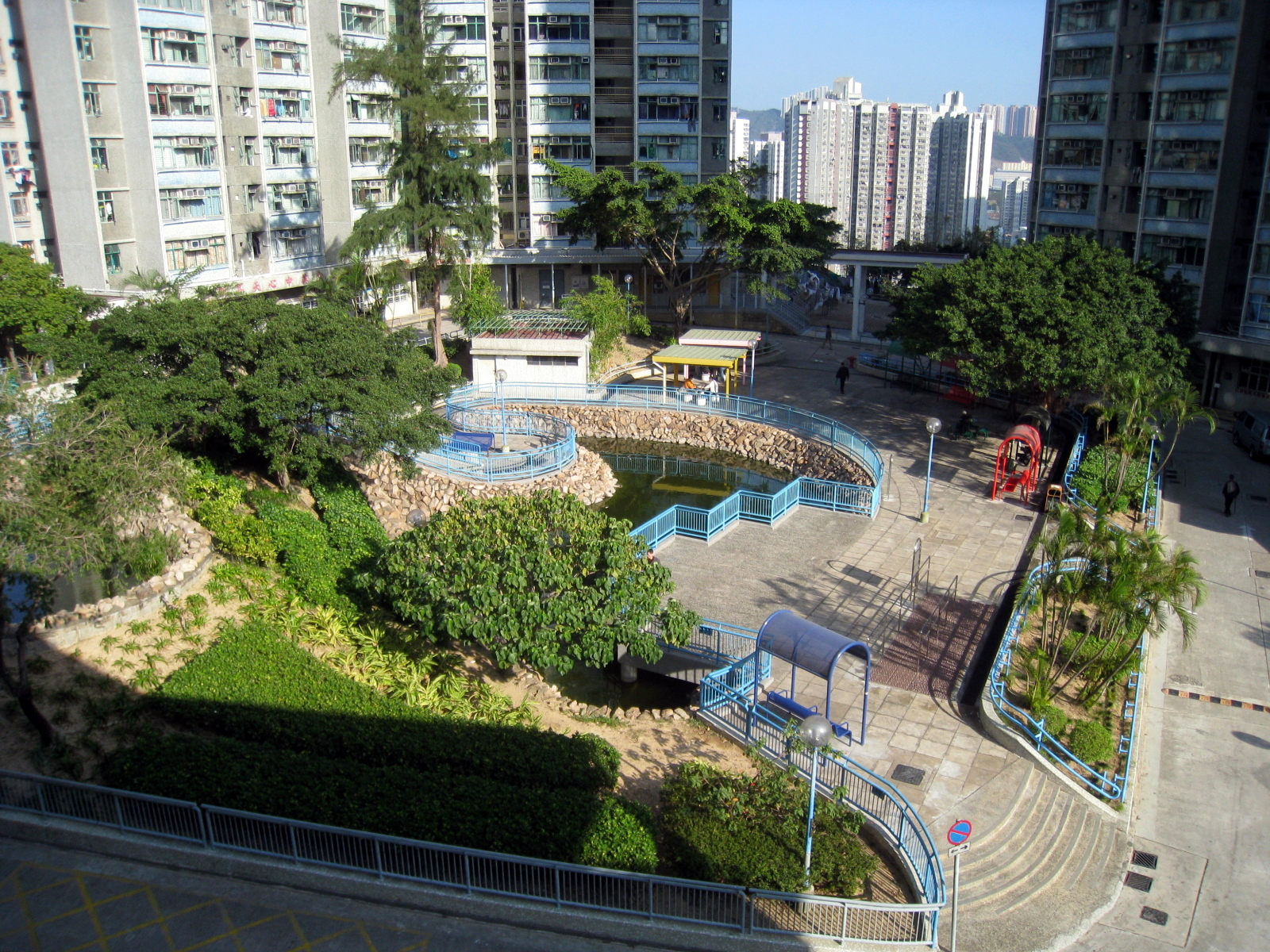 Cheung Hang Estate 長亨邨